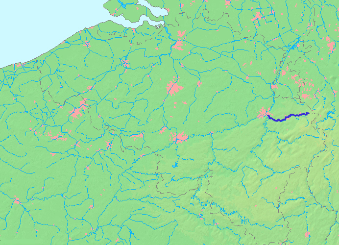 Kaart van de Vesder op basis van Wikimedia Commons kaart MapBelgiumWater